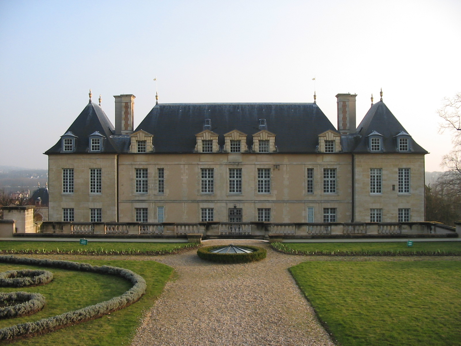 Château d'Auvers-sur-Oise, vue arrière. Musée des impressionnistes.